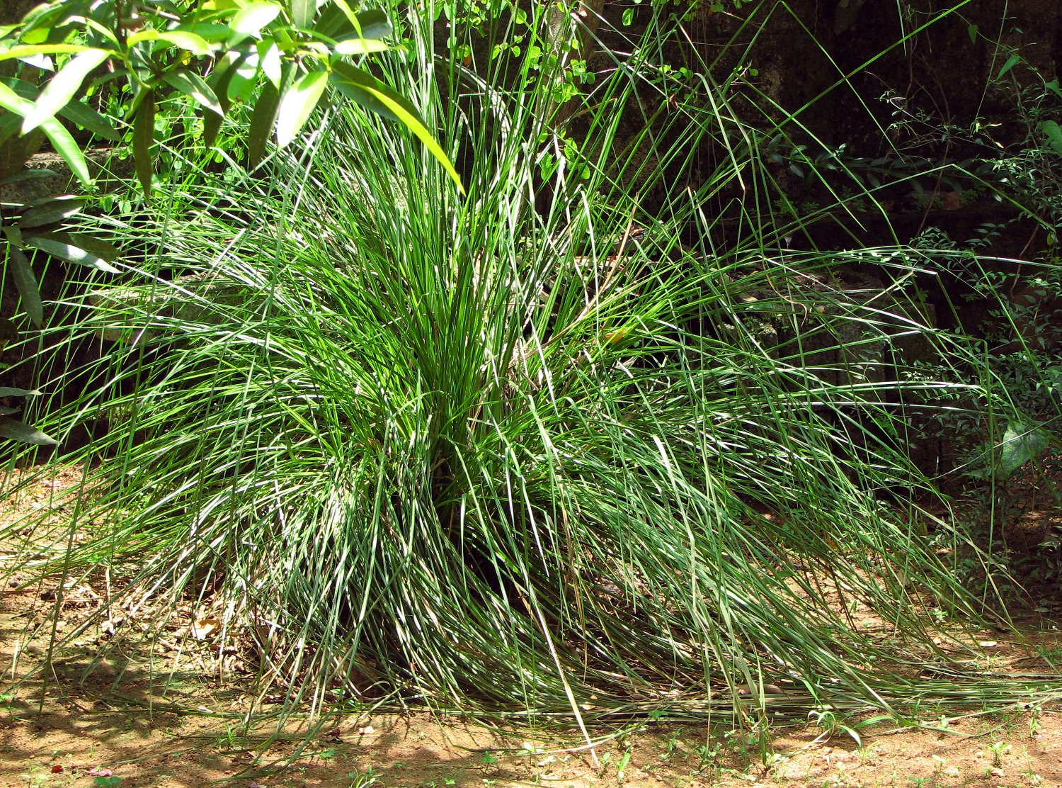 രാമച്ചം